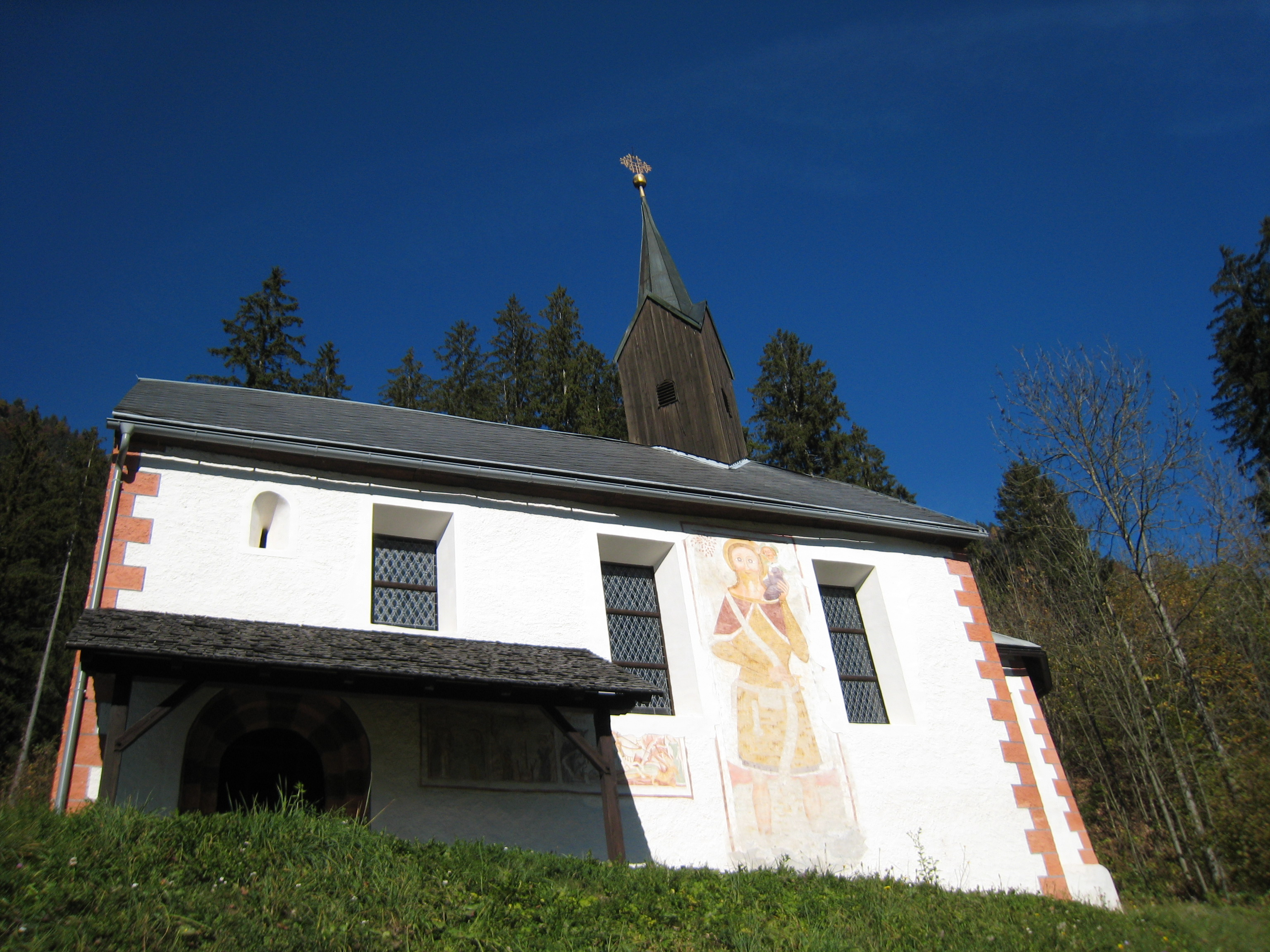 Kirche in Gerlamoos, Steinfeld